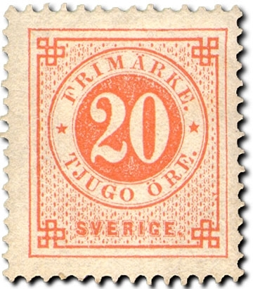 Frimärke 20 öre 1877, från Postmuseums samlingar. Märket hade sin främsta användning som porto för utlandsbrev. Till de allra flesta mottagarländerna utanför Skandinavien gällde 20-öresportot – även till Finland. Till vissa mycket avlägsna länder eller till sådana som inte var anslutna till Världspostföreningen var avgiften högre. Tjugoöresmärket användes också, tillsammans med valören 5 öre, på inrikes postanvisningar. Den tidigaste kända avstämplingen är den 23 juli 1877. Fyra otandade, stämplade ex. är kända. I en upplaga av märket (december 1879) uppstod det världsberömda feltrycket 20/Tretio. Det blev ett märke med dubbla budskap – 20 i siffror och, mer diskret, Tretio med bokstäver. Då man på Bagges tryckeri granskade plåten inför en ny upplaga av 20-öresvalören upptäcktes att en kliché var skadad. Då tiden var knapp valde man att såga ut en kliché från en plåt för tryckning av 30-öresmärken. Ur denna svarvade man bort mittpartiet och pluggade i stället in en del av en kliché med valörangivelsen 20. I hastigheten glömde man 20 öre. Märkena framställdes utan vattenmärke (endast i arkmarginalerna). Ogiltiga till frankering fr. o. m. den 30 december 1910.